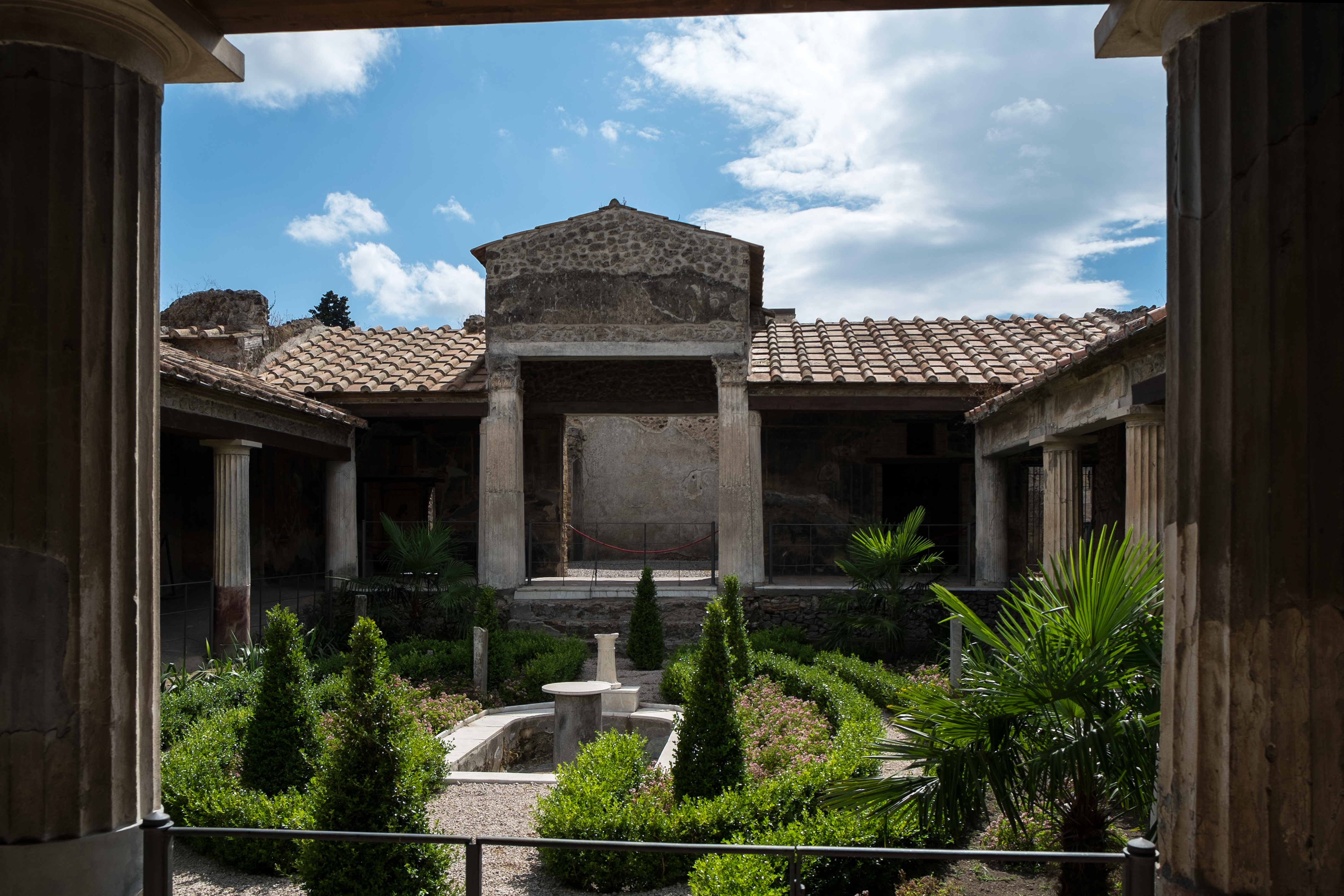 Casa degli Amorini Dorati This is a photo of a monument which is part of cultural heritage of Italy.